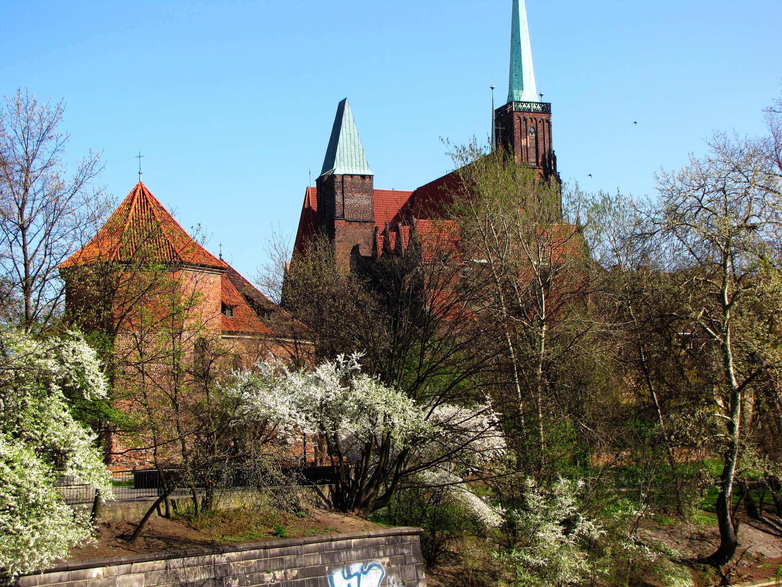 Wrocław